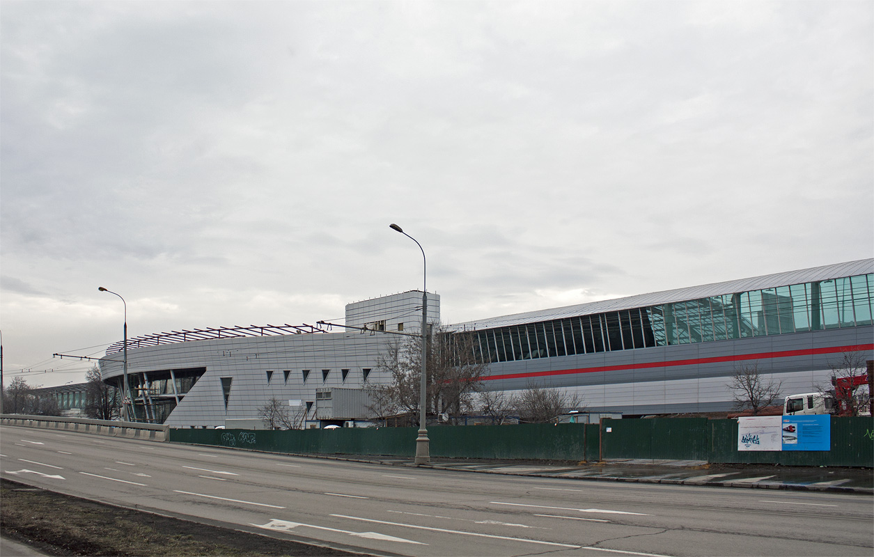 Платформа Лужники МКЖД, вид со стороны ул. Хамовнический Вал, 9 марта 2015 г.